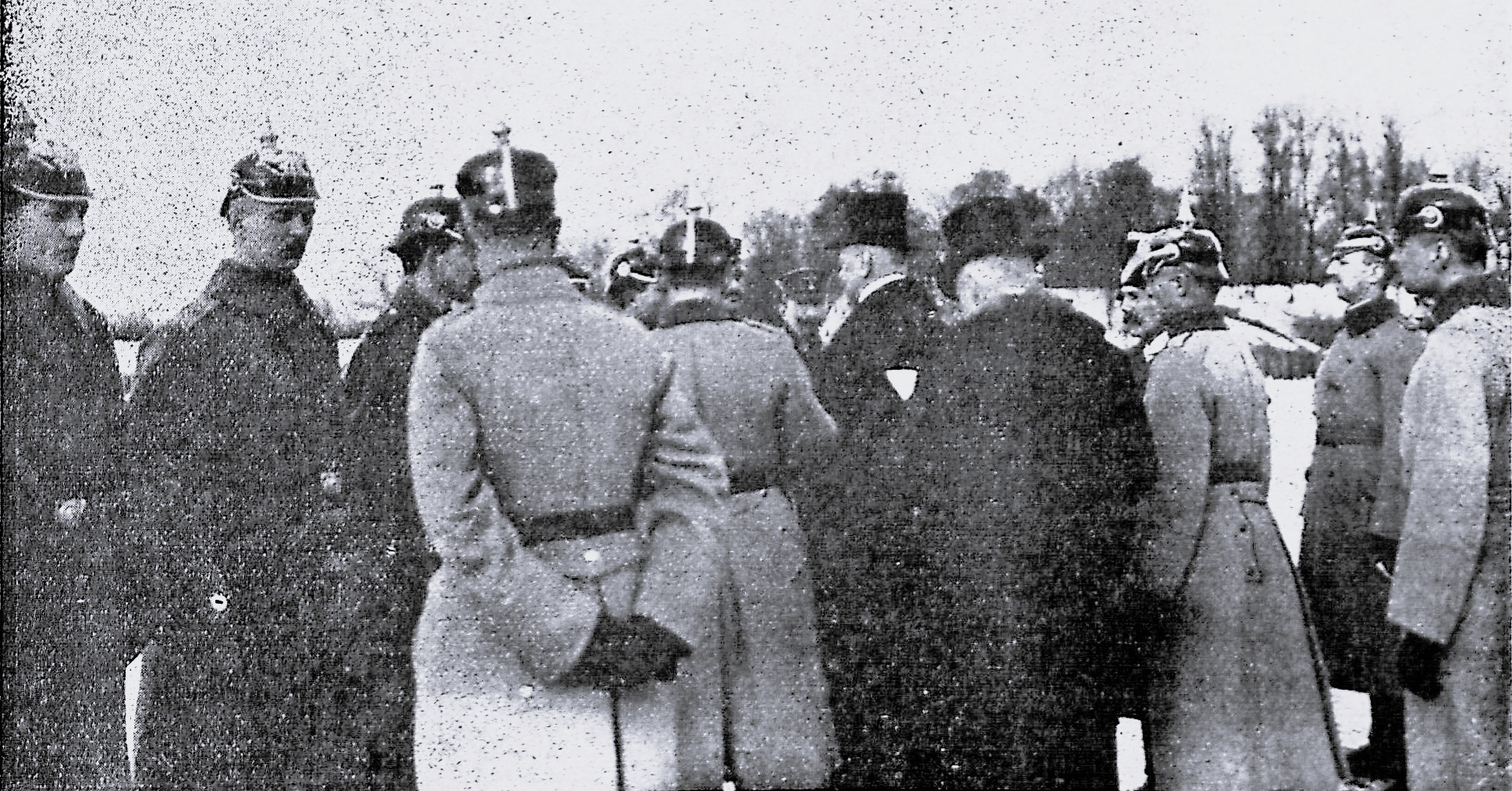 Se. Magnifizenz Herr Bürgermeister Dr. Fehling verleiht verdienten Kriegern zum Abschluss der Feierlichkeiten anlässlich des Kaisergeburtstages auf dem Buniamshof am 27. Januar 1917 das Lübecker Hanseatenkreuz.